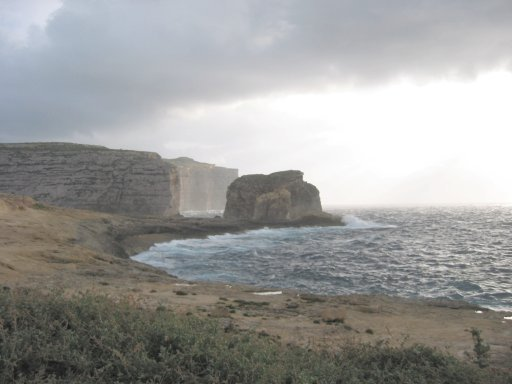 Fungus Rock on December 25, 2002